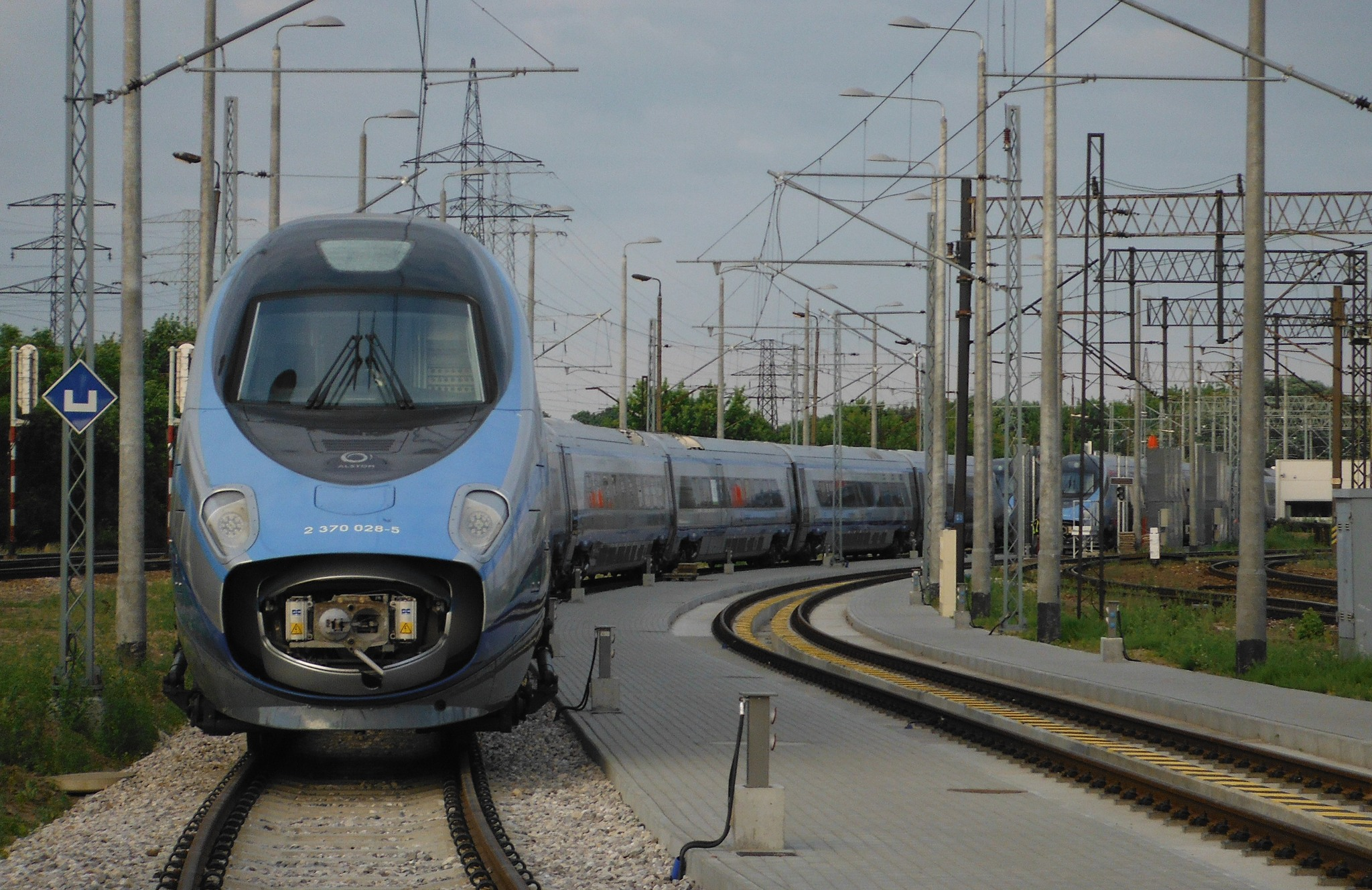 Pociągi Pendolino (Warszawa, Kozia Górka).